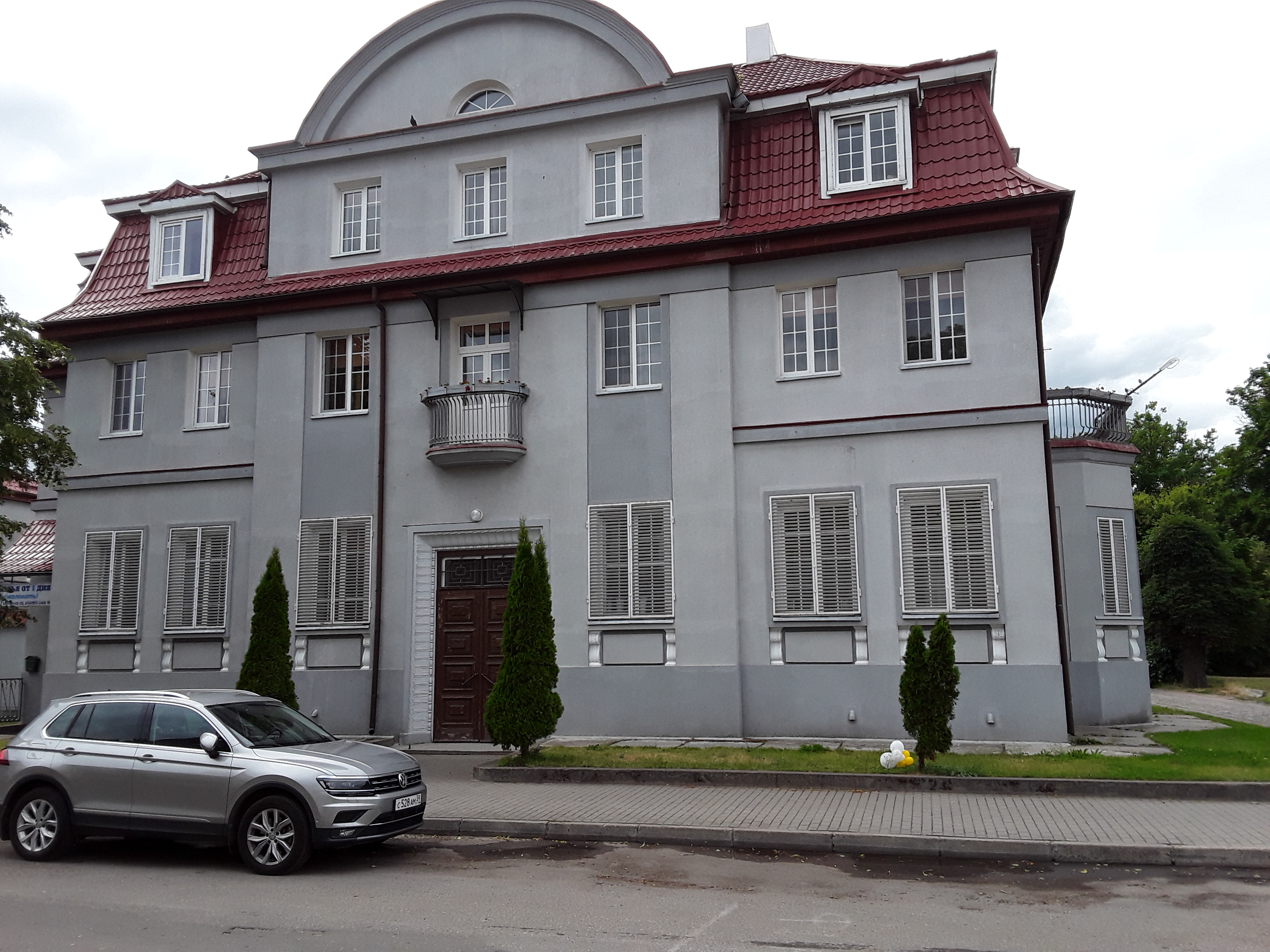 Heinrichswalde, Gebäude der früheren Kreissparkasse in der Friedrichstraße